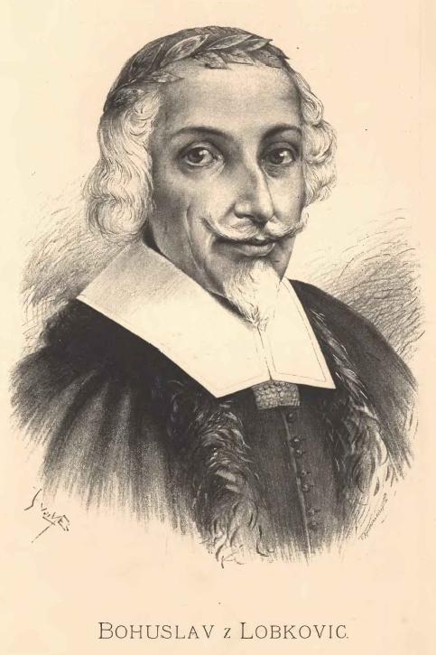 Portréty předních osobností od Jana Vilímka